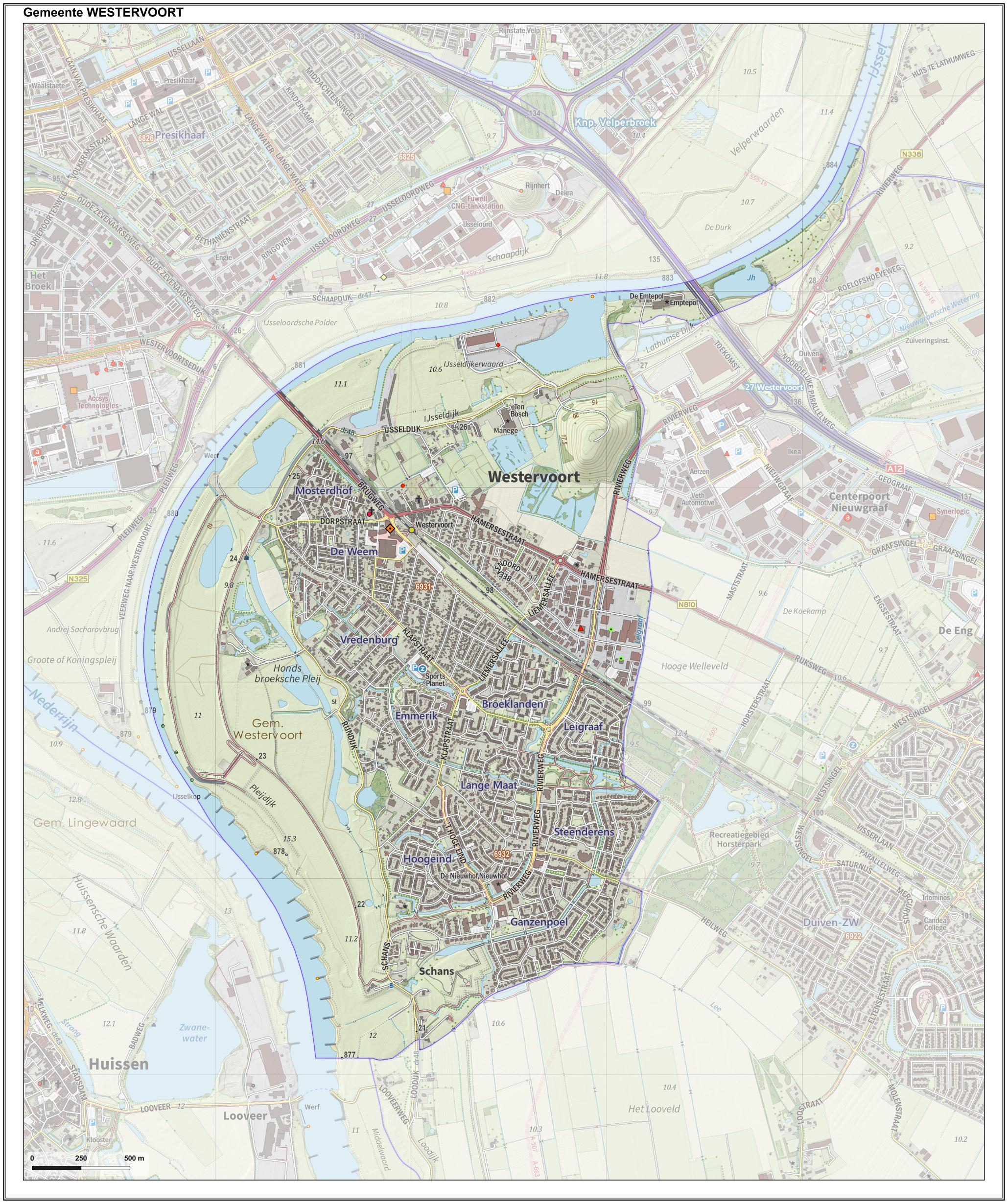 Topografische gemeentekaart. Resolutie: 400 pixels/km. Kaartbeeld samengesteld uit de open geodata van de Top10NL en Top25namen (Kadaster), Creative Commons-BY licentie. Gebouwvlakken uit open geodata BAG extract. Wegen uit de OpenStreetMap, OpenStreetMap community. Reliëfschaduw uit de Actuele Hoogtekaart AHN2. Samenstelling en kleurenschema: Jan-Willem van Aalst, met QGIS. Zie ook de Legenda.